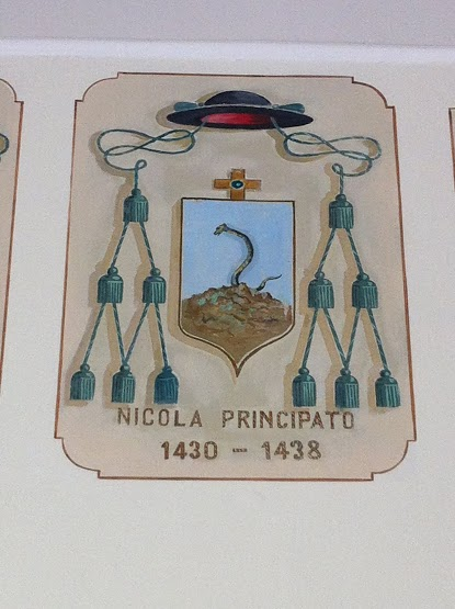 Stemma di Nicola Principato, vescovo di Policastro dal 1430 al 1438, dipinto in una sala del palazzo arcivescovile